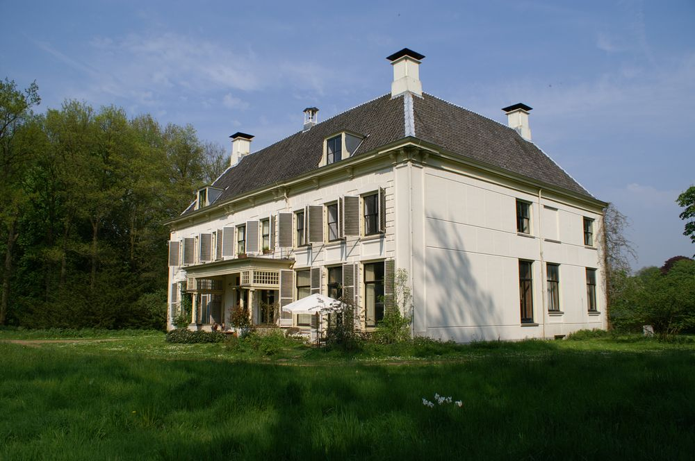 Kasteel Nieuw Amelisweerd